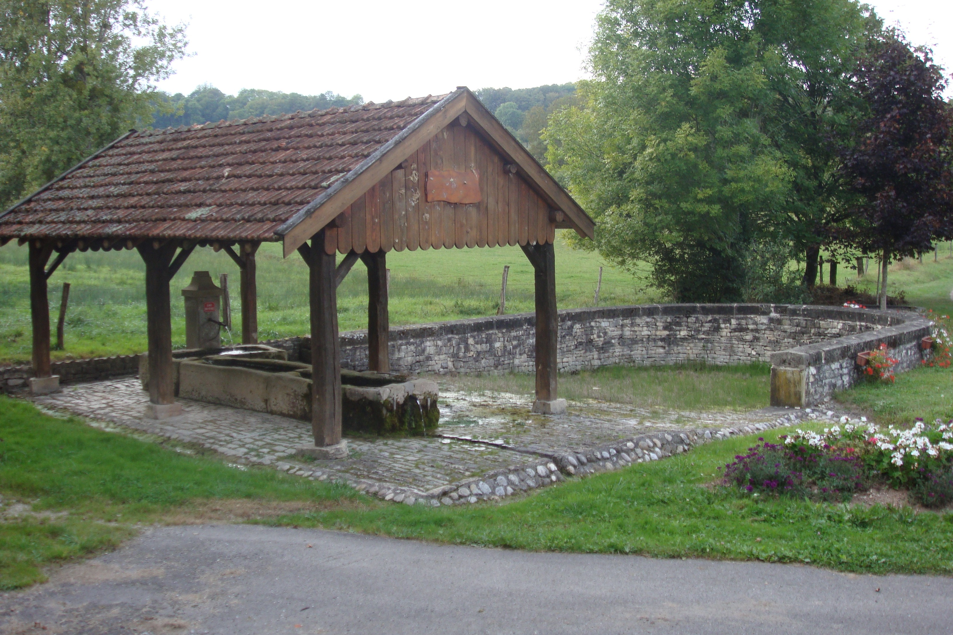 Gugney-aux-Aulx - Gayoir (Lavoir à chevaux) attenant à la fontaine de Bacot à l'extrémité ouest de la rue de la poirie, sur la rive du ruisseau des Corbelles